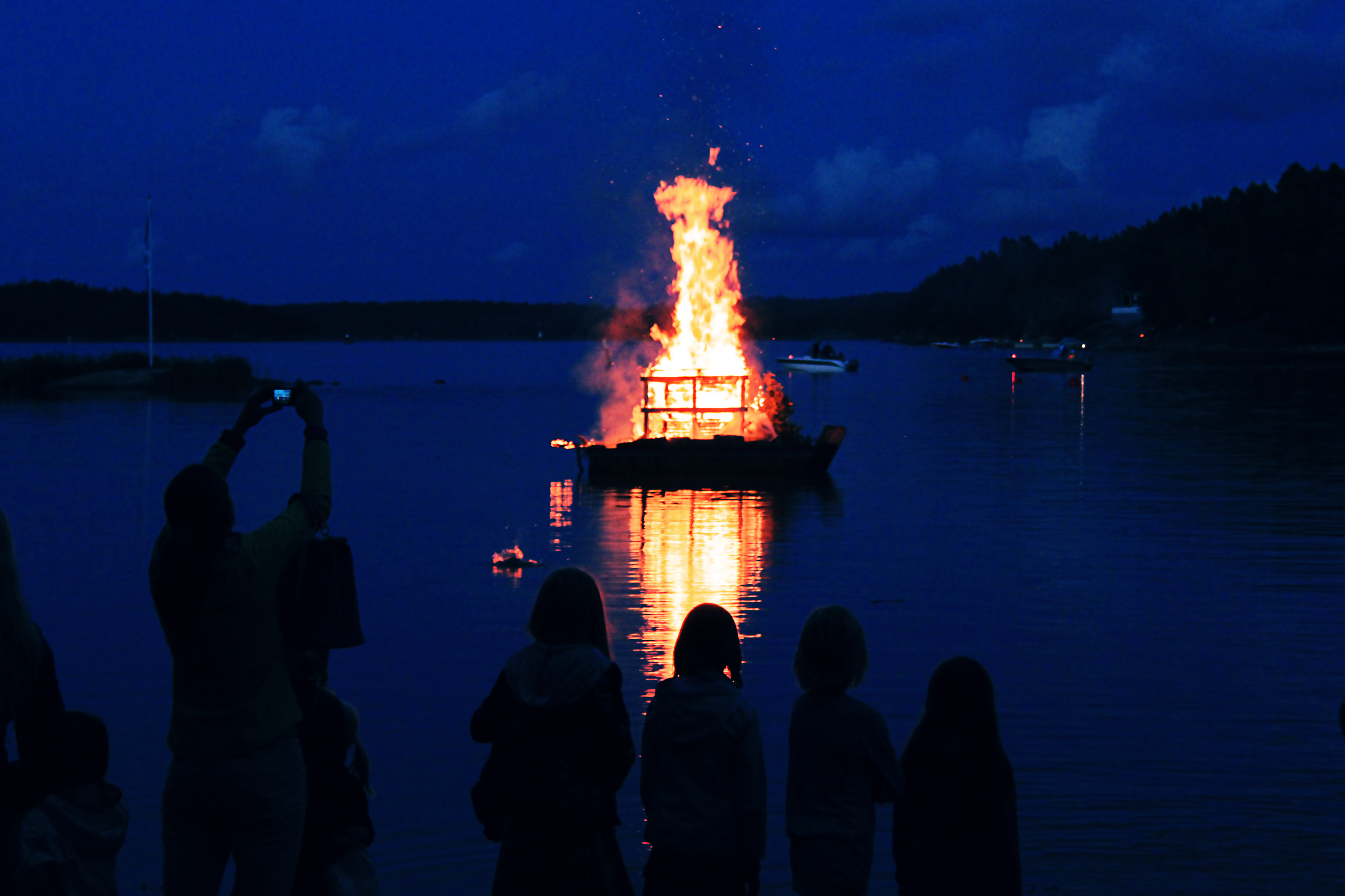 Bild på brasan vid Forneldarnas natt i Nagu år 2012